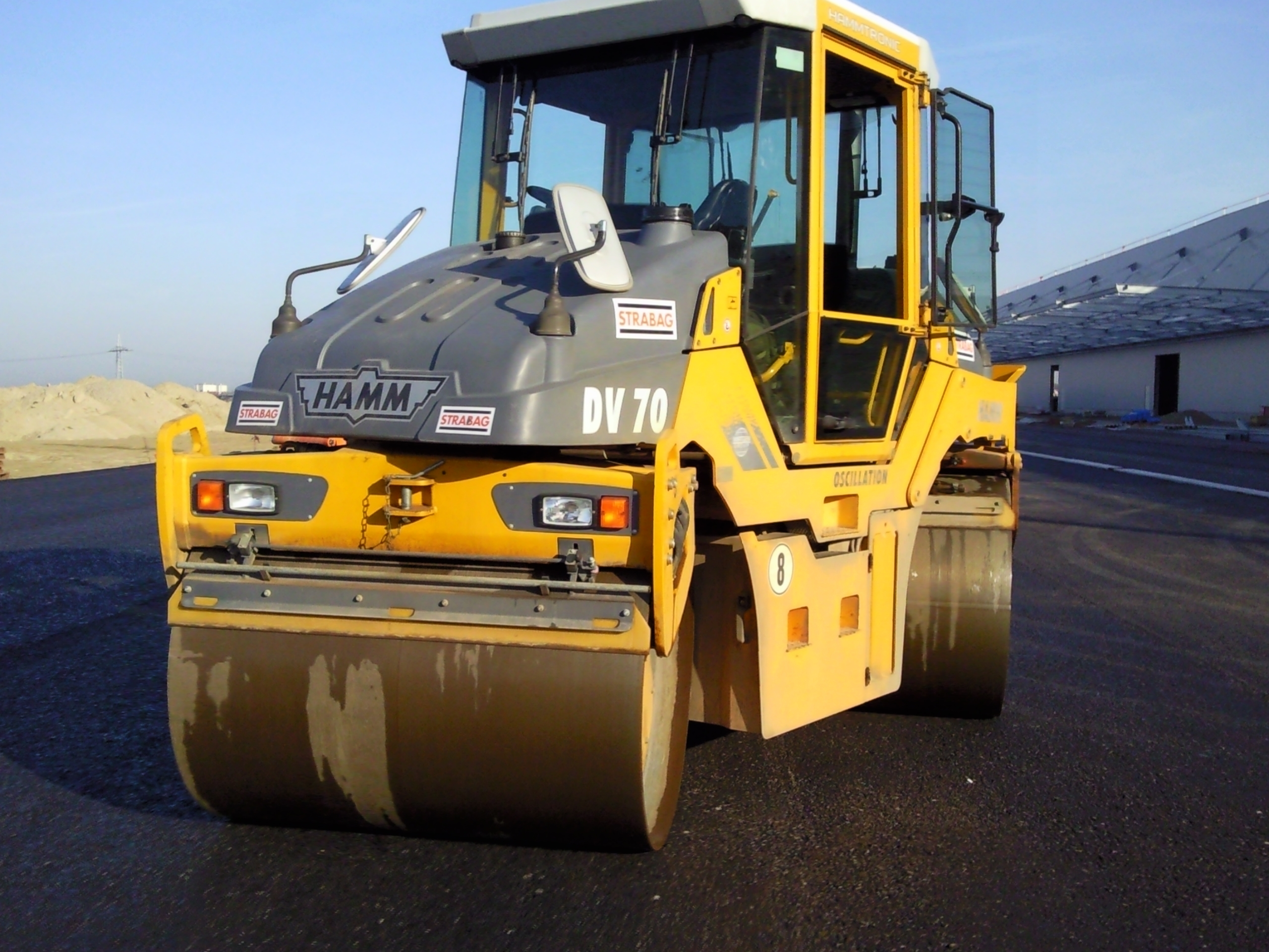 DV70 von Hamm mit maximalem Hundegang.